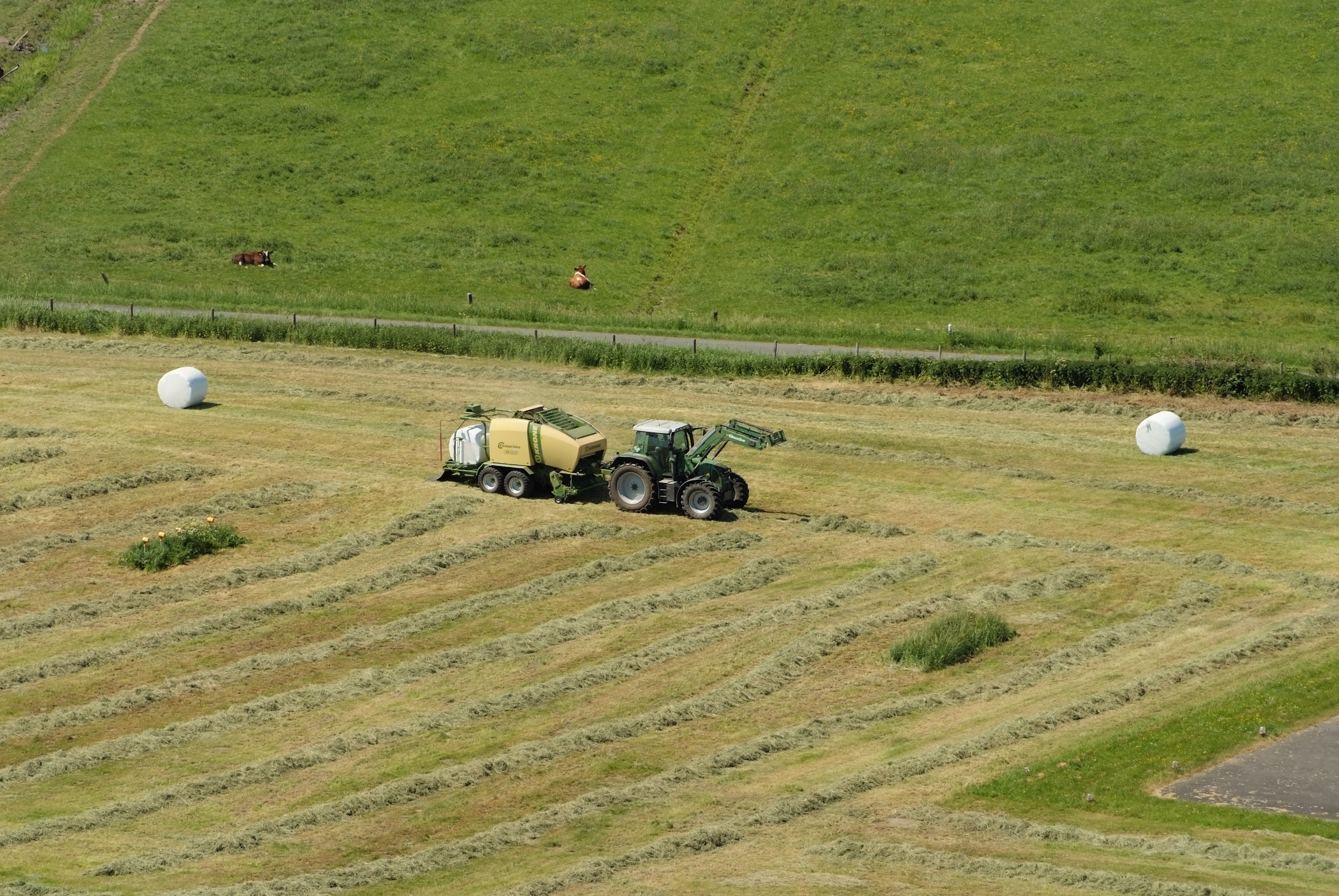 Fotoflug vom Flugplatz Nordholz-Spieka über Cuxhaven und Wilhelmshaven